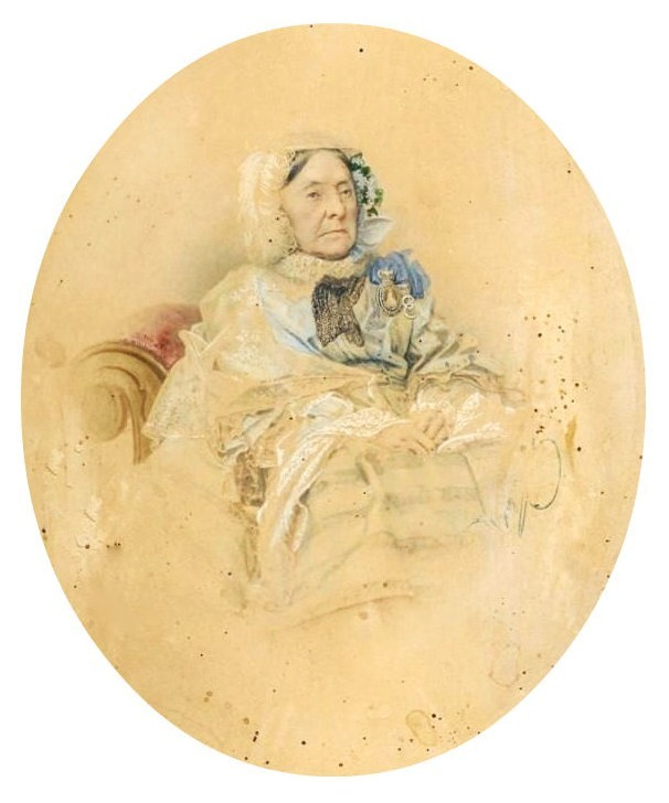 Портрет статс-дамы , фрейлины императрицы Екатерины II. Возможно Прасковья Ивановна Мятлева, ур Салтыкова (1772—1859), фрейлина с 1792, статс-дама с 20.04.1848 года.